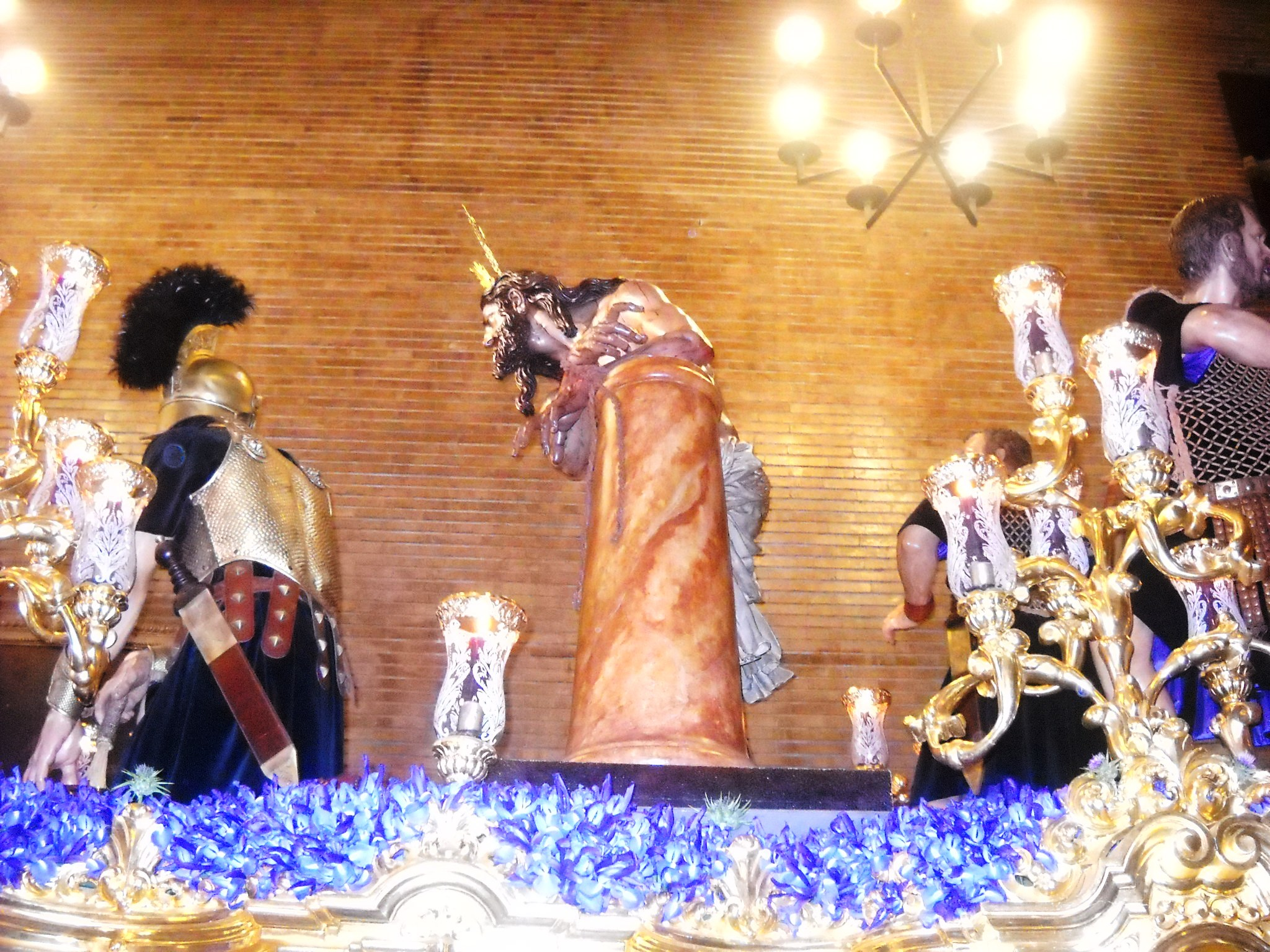 Paso de Misterio